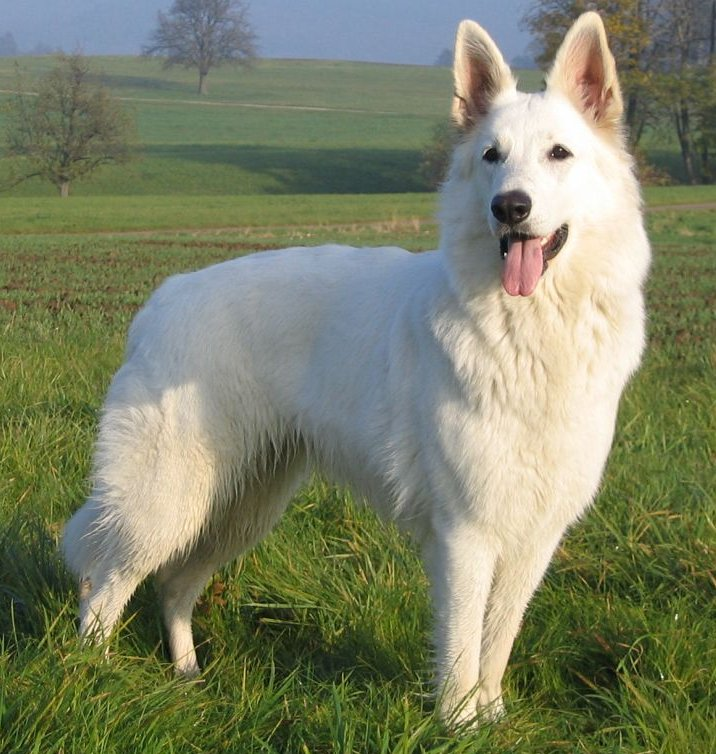 Berger Blanc Suisse, Hündin, 2 Jahre alt